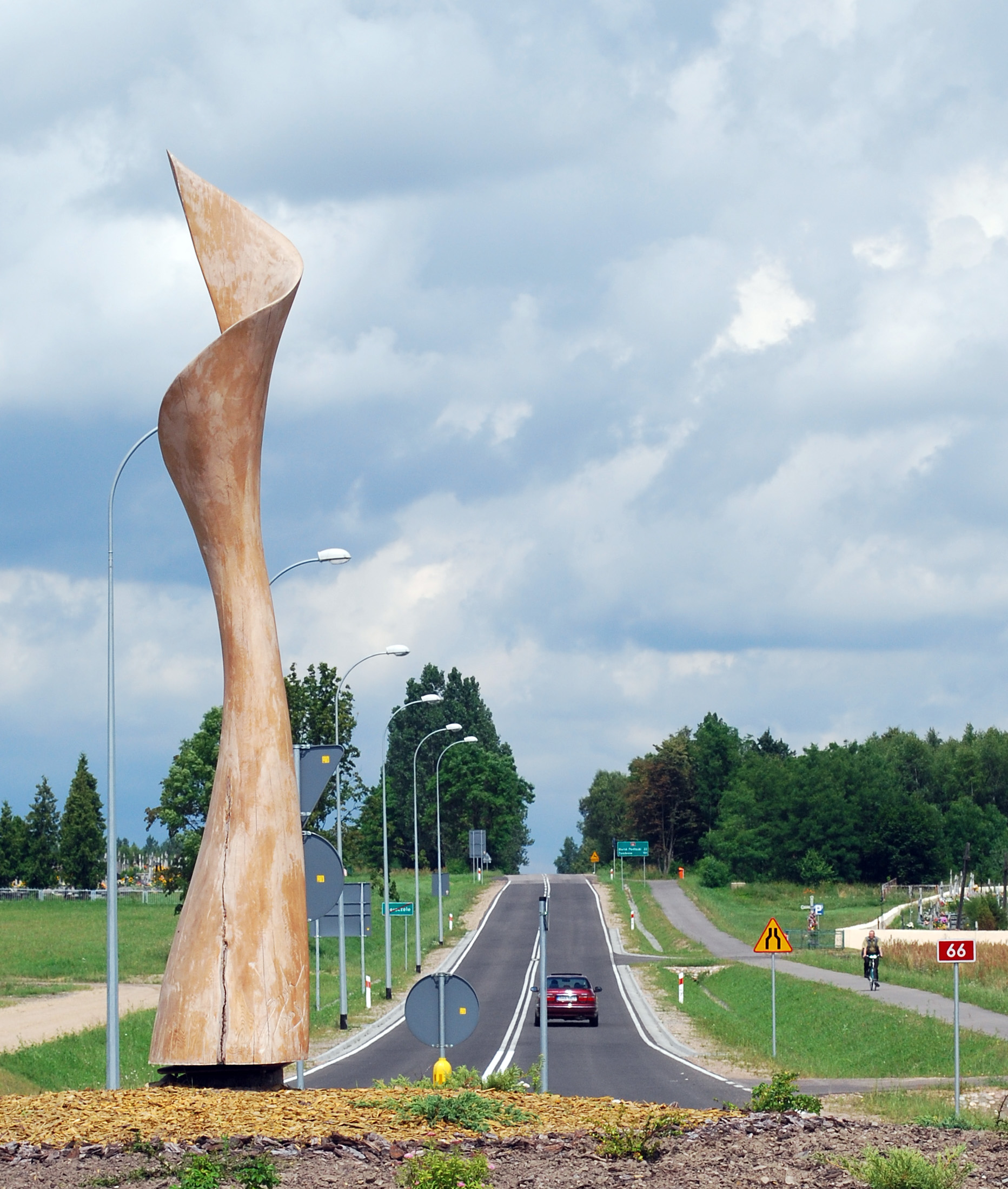 Droga krajowa nr 66 – skrzyżowanie z drogą wojewódzką nr 685 w Kleszczelach.